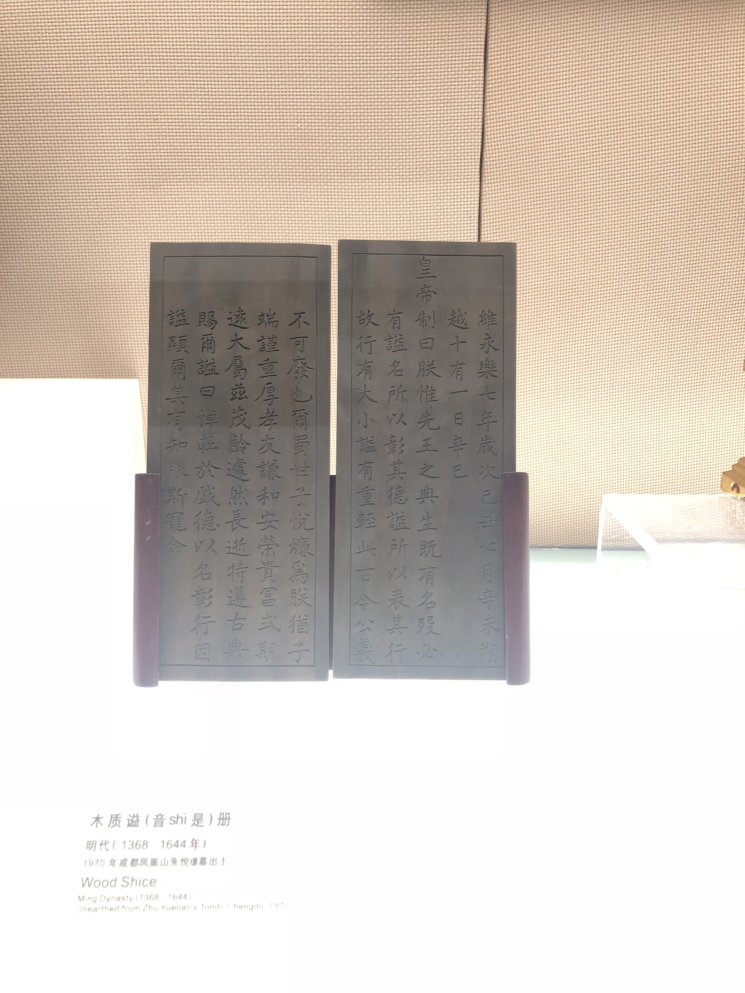 中文（台灣）: 悼莊世子墓文物